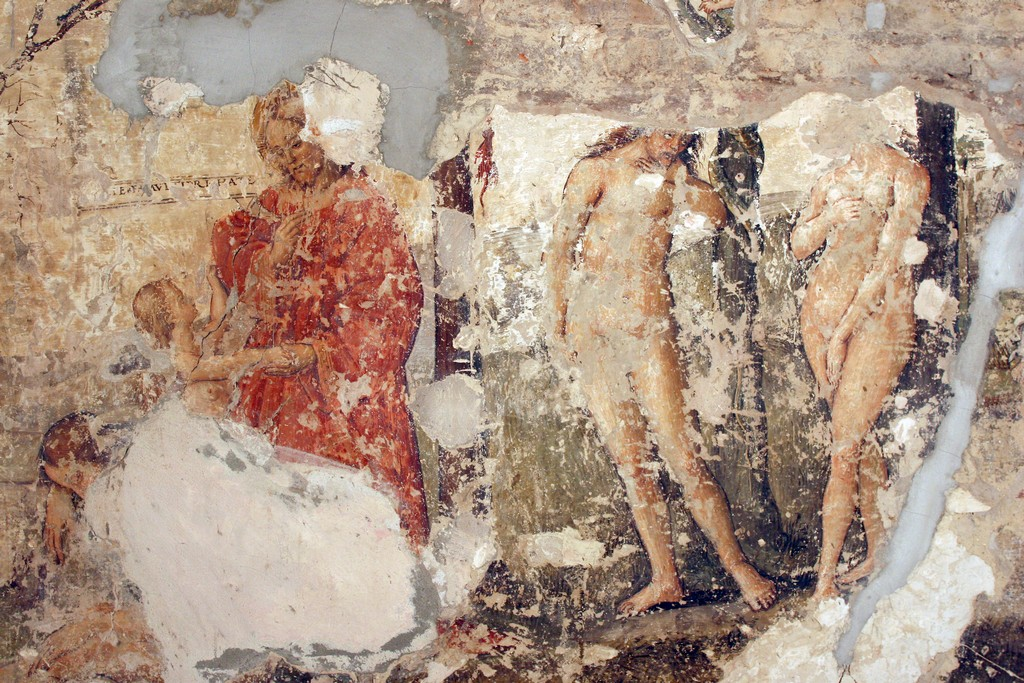 Affresco del 1500